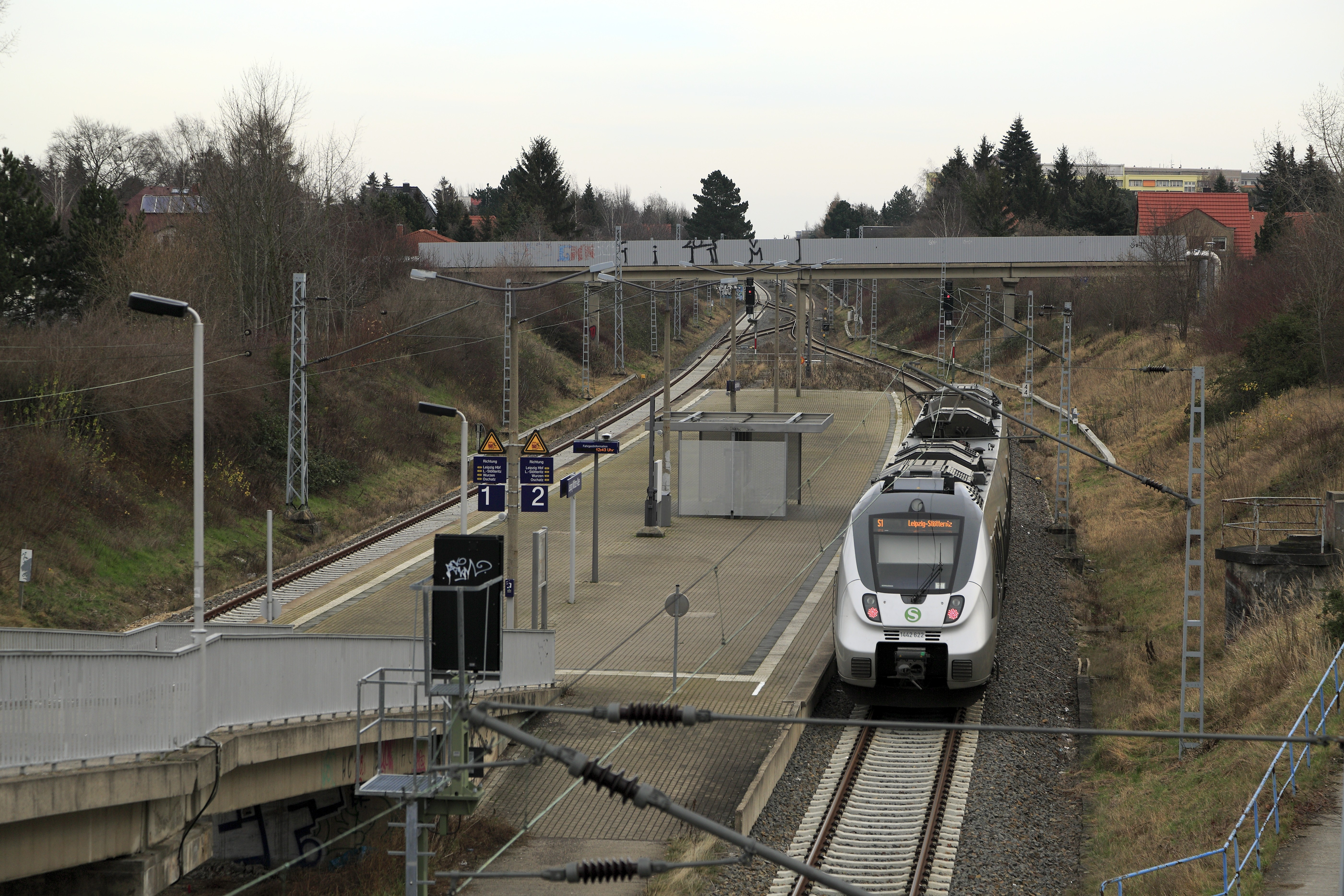 Nur bei diesem Bahnhof hat man einen Inselbahnsteig gebaut. Solange nur ein Halbstundentakt möglich ist, reicht ein Bahnsteiggleis für den Regelbetrieb. Das Weichentrapez auf der Ostseite ermöglicht Bahnsteigwenden auf beiden Gleisen. Die Brücke im Hintergrund ist nur eine Rohrbrücke für Fernheizleitungen, eine zusätzliche Zugangsmöglichkeit an dieser Stelle wäre für die Akzeptanz der S-Bahn bei den potentiellen Nutzern trotzdem ausgesprochen sinnvoll.